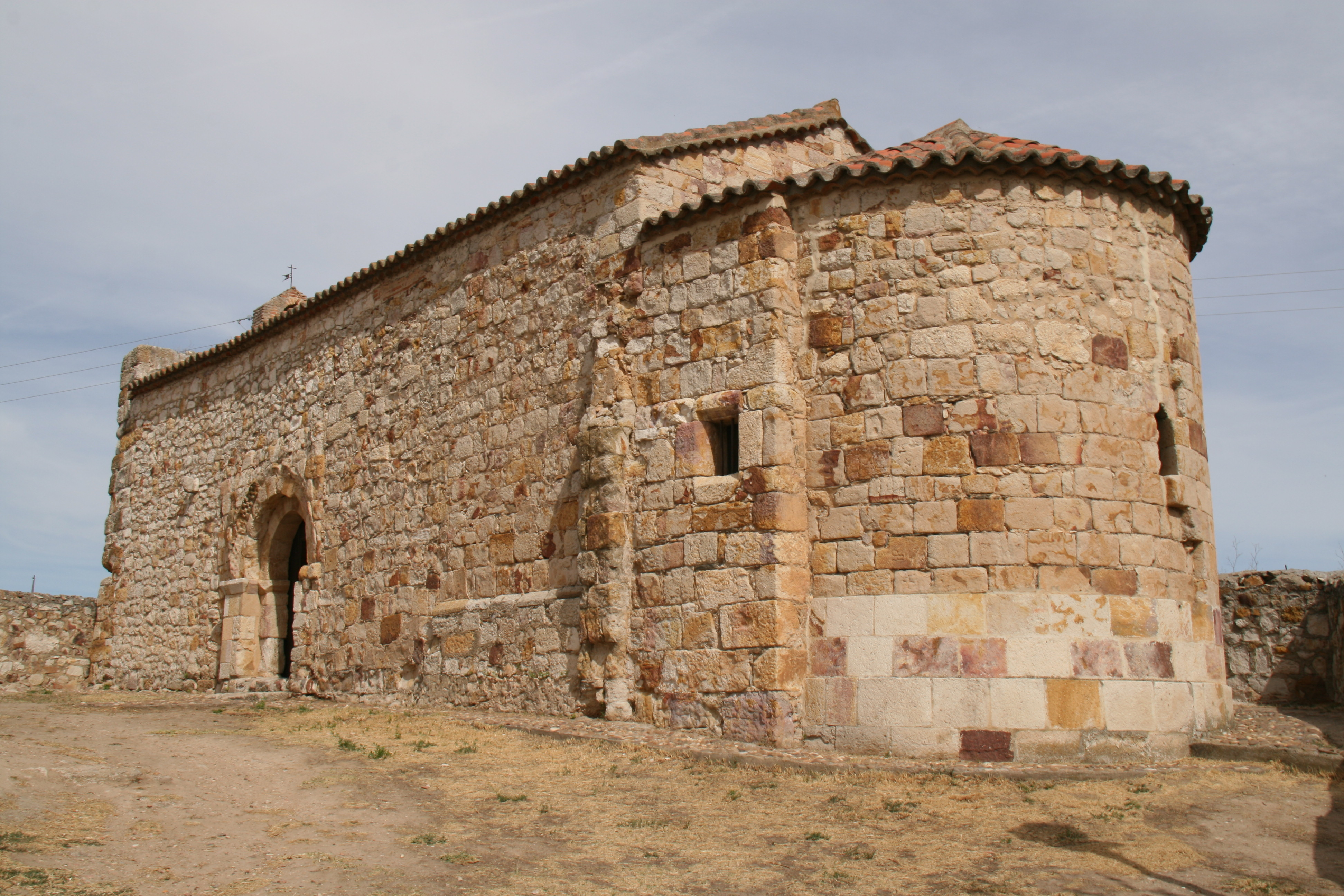 Fachada de Santiago de los Caballeros, Zamora